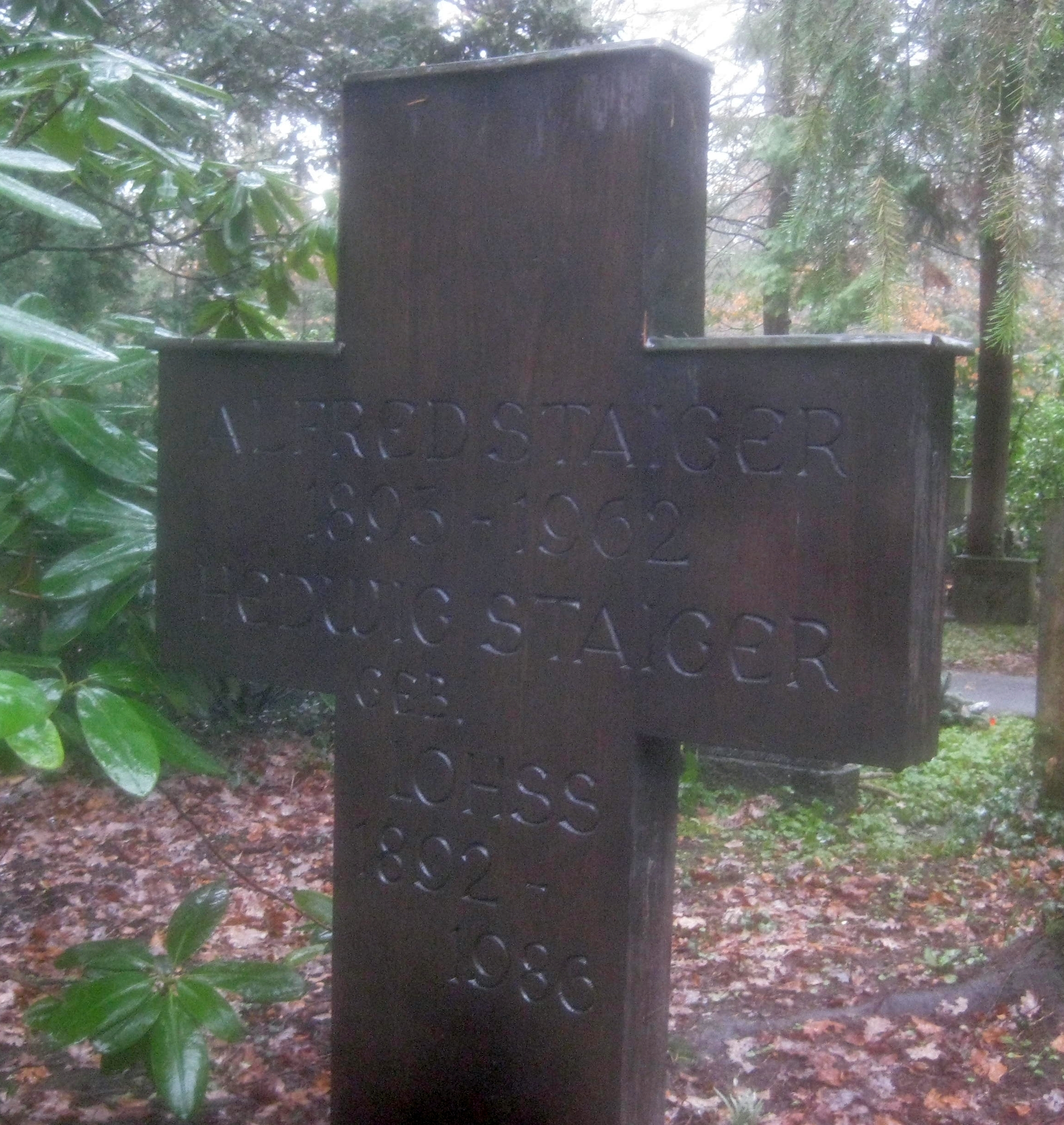 Grab von Hedwig Lohß, Stuttgart, Waldfriedhof Stuttgart, Abteilung 05 e.